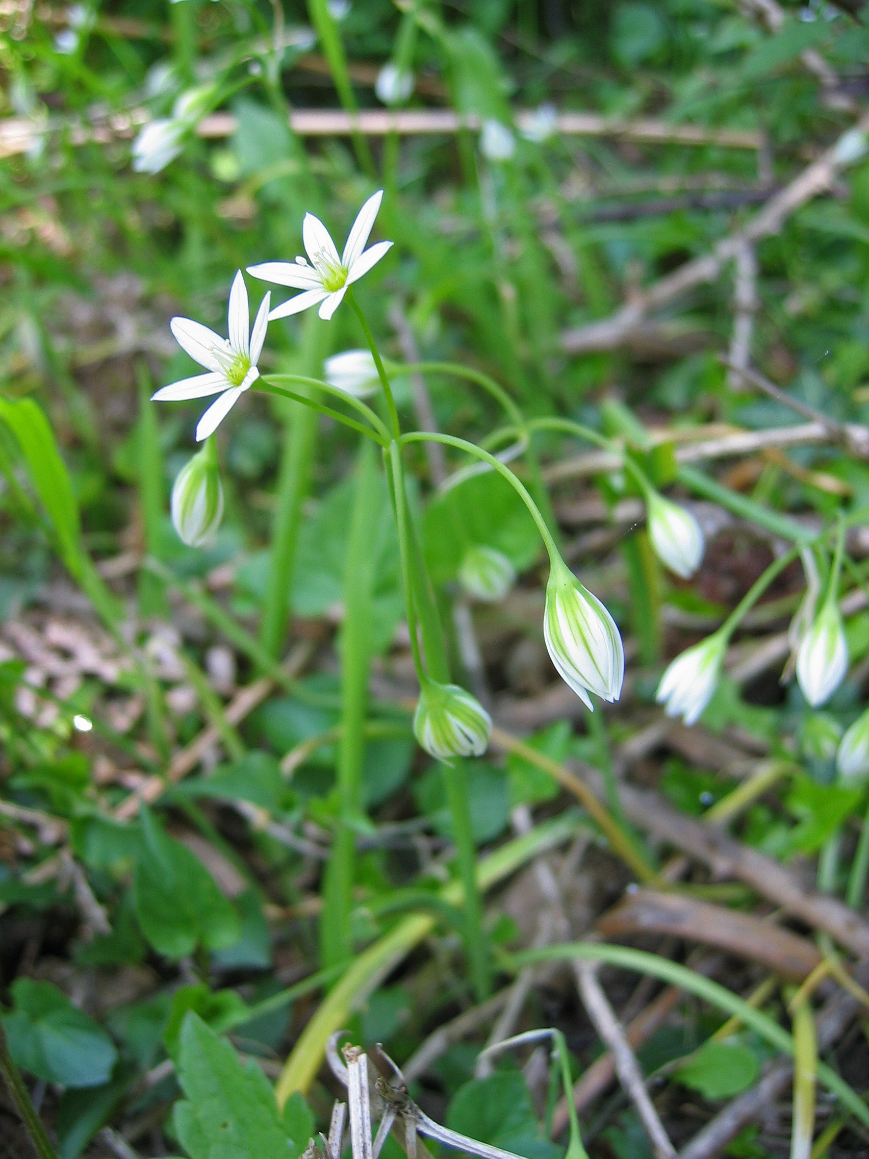 Allium pendulinum Near Monte San Petrone, Corse, France